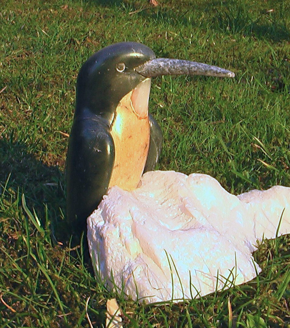 "Artenschutz" ist eine Skulptur aus 6 farblich unterschiedlichen Specksteinarten, die unsere Artenvielfalt sowohl aus ornithologischer, als auch aus mineralischer Sicht symbolisiert. Gefertigt 1994 von Arnold Schoger.